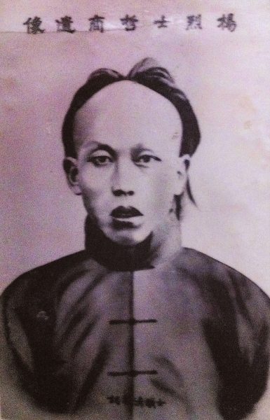 杨哲商烈士遗像